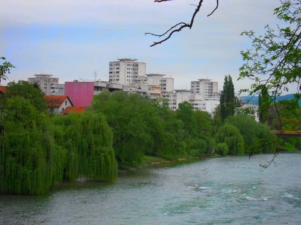 Vrbas_i_zgrade_u_Boriku